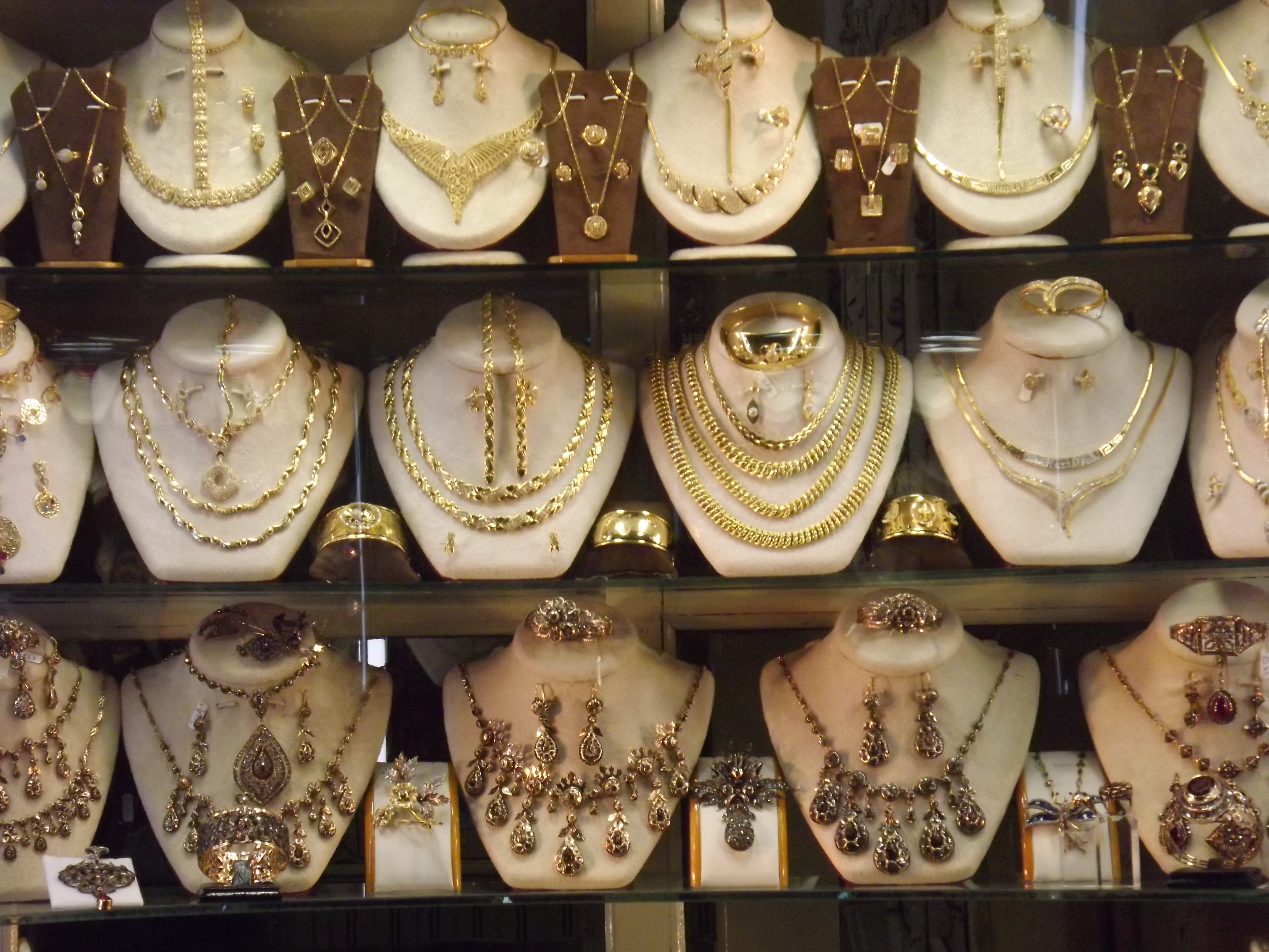 Parures en Or au souk el Berka